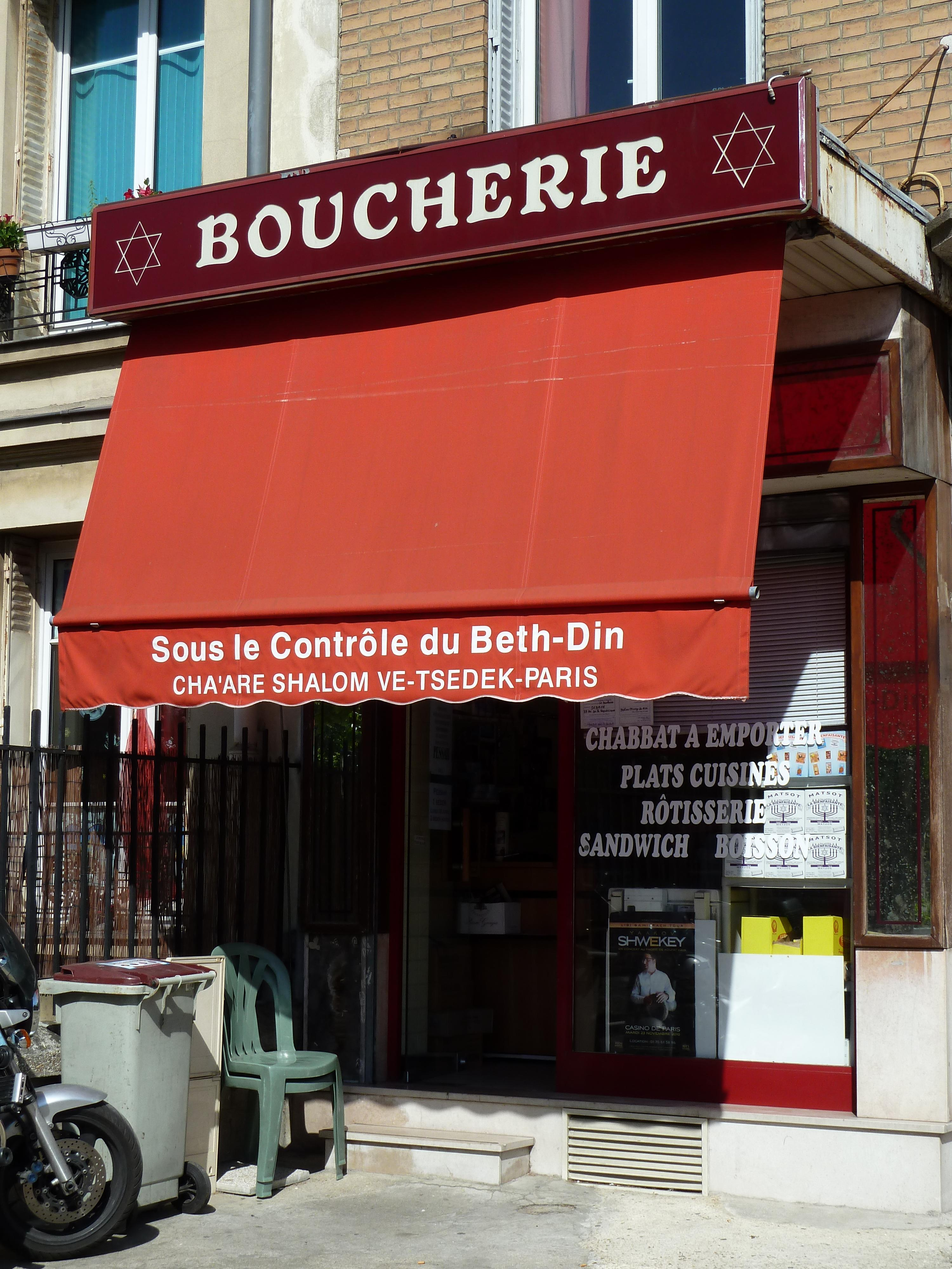 Choisy-le-Roi (94), 37 Avenue de la République, Boucherie cachère (Boucherie Sebagh)